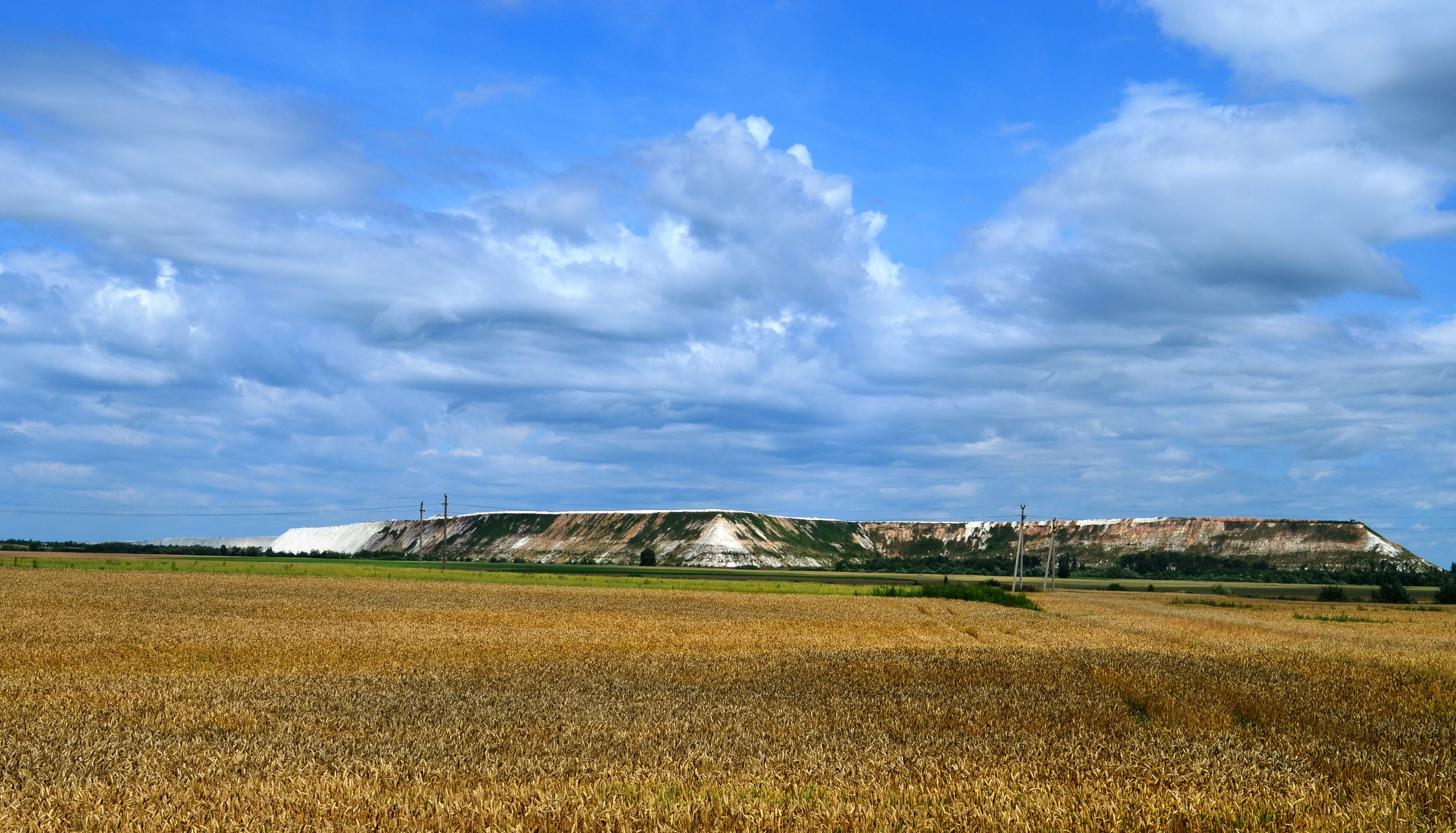 AB "Lifosa" fosfogipso kalnai nuo Medekšių. Kėdainių raj.